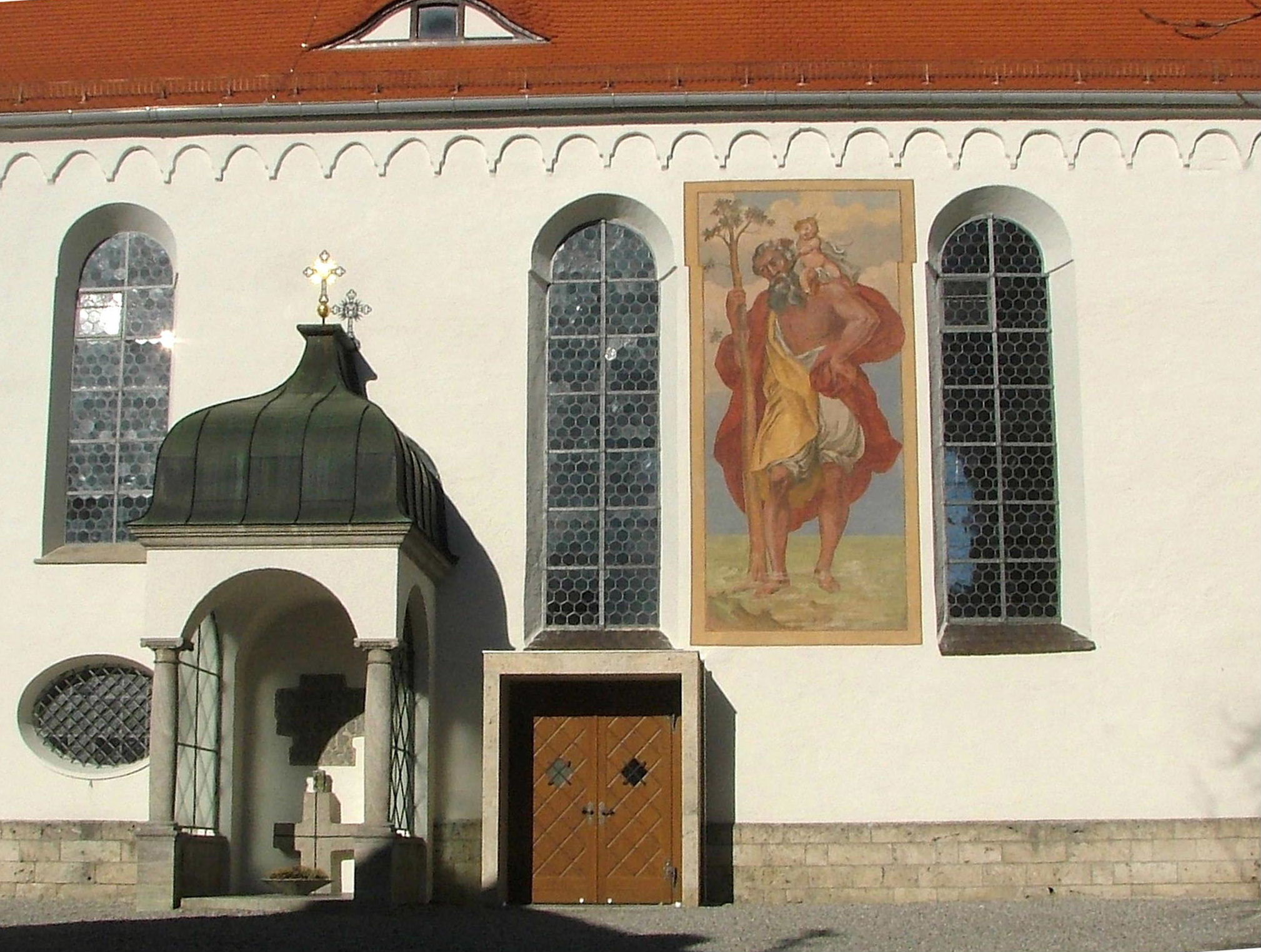 Obergünzburg, Pfarrkirche St. Martin, Christopherus-Darstellung